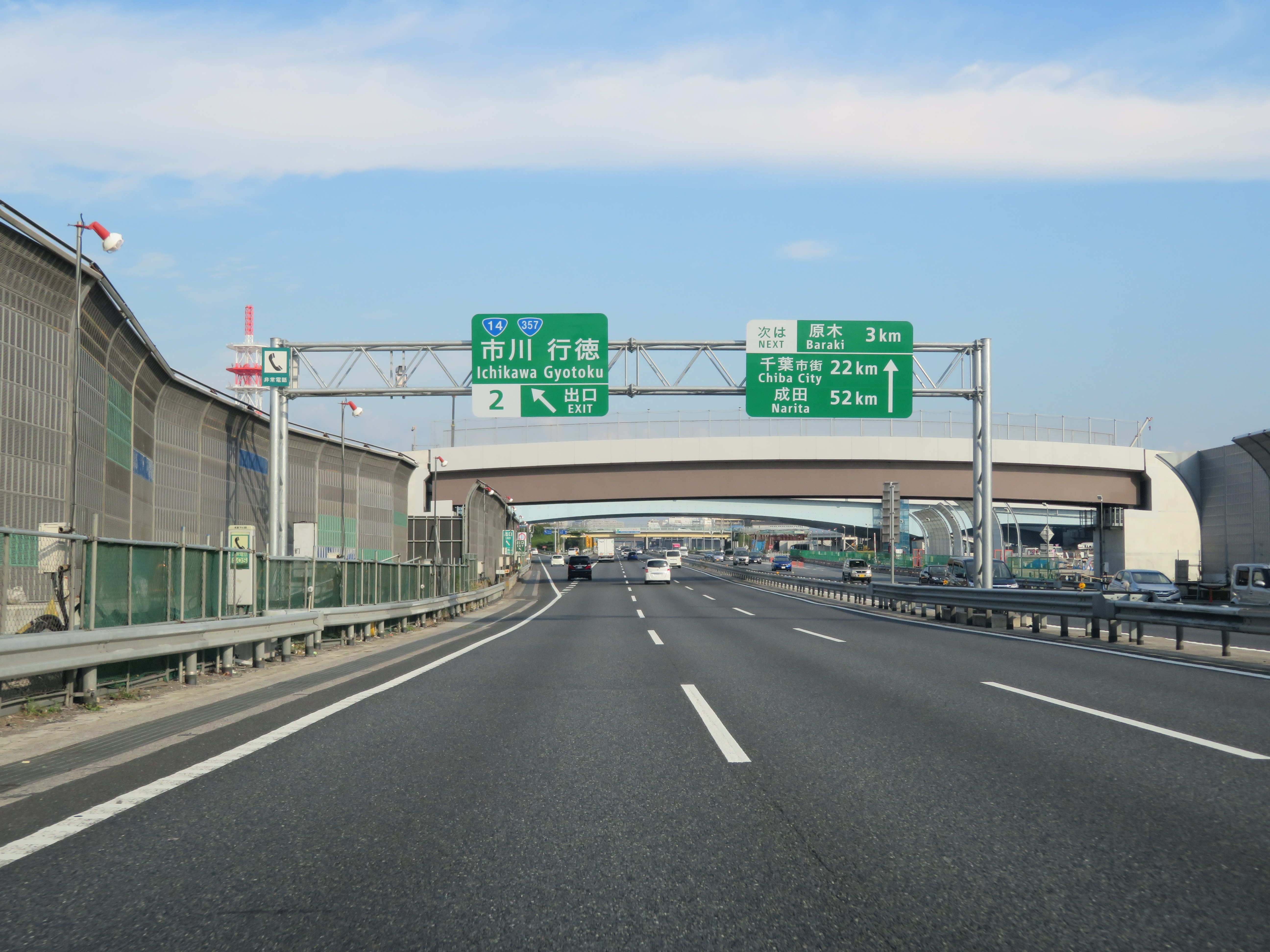 京葉道路市川IC 下り出口付近